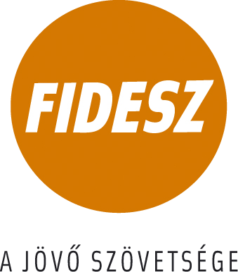 A Fidesz logója